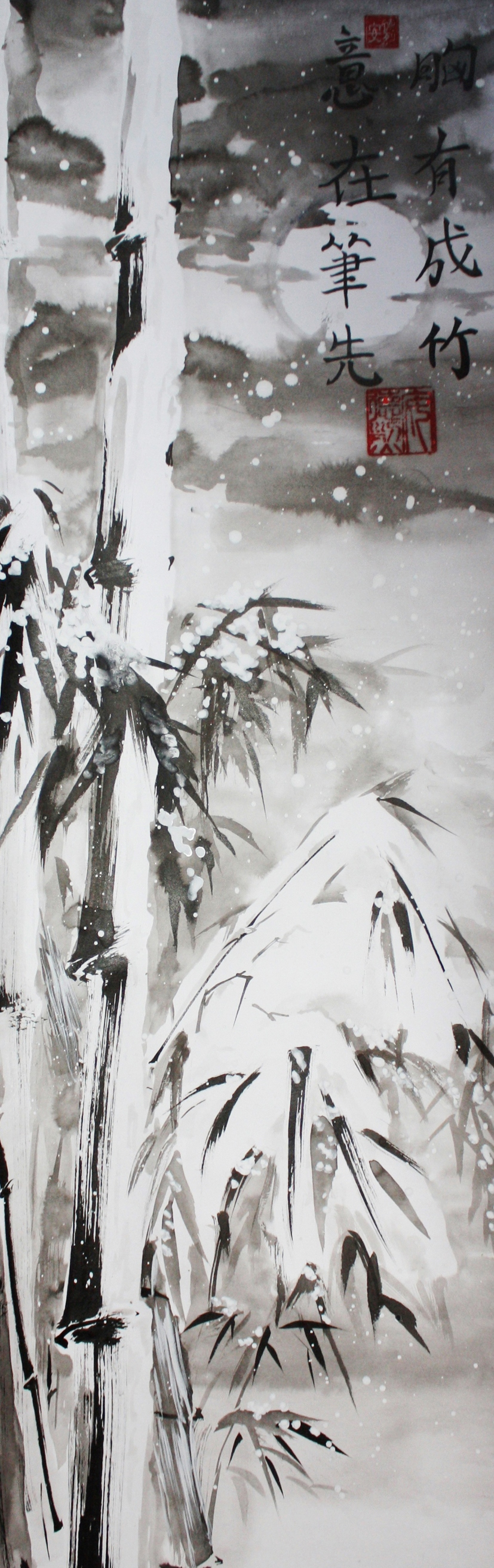 Пример картины живописи У-син